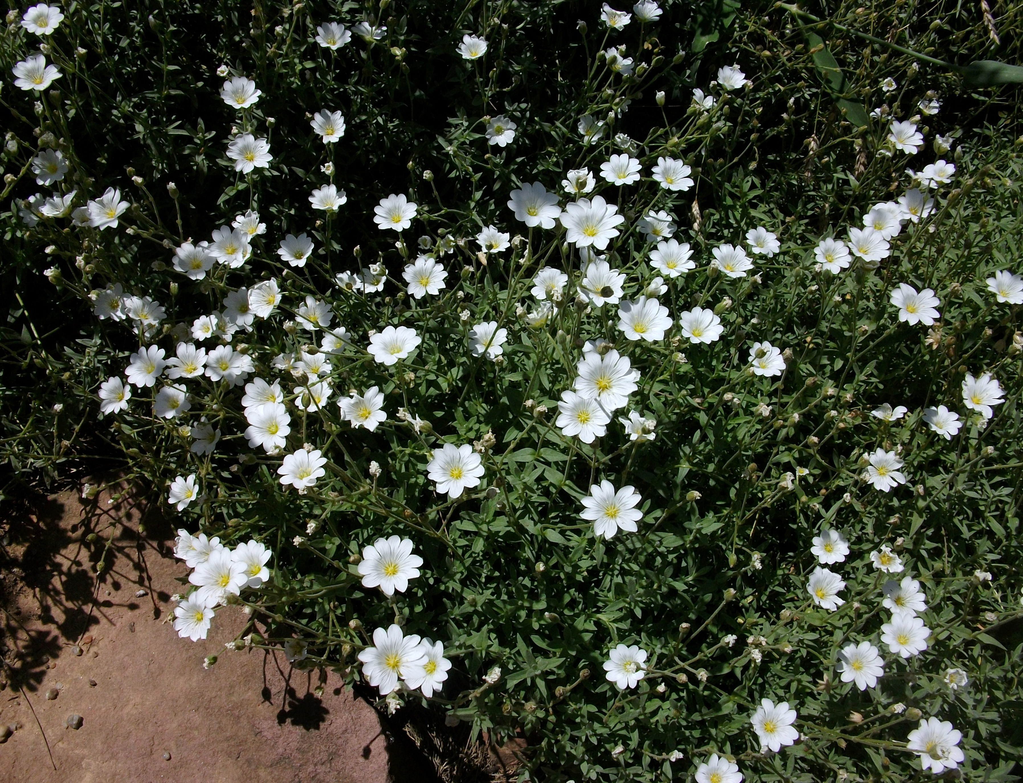 Cerasti de Gibraltar (Cerastium gibraltaricum), jardí botànic, València.